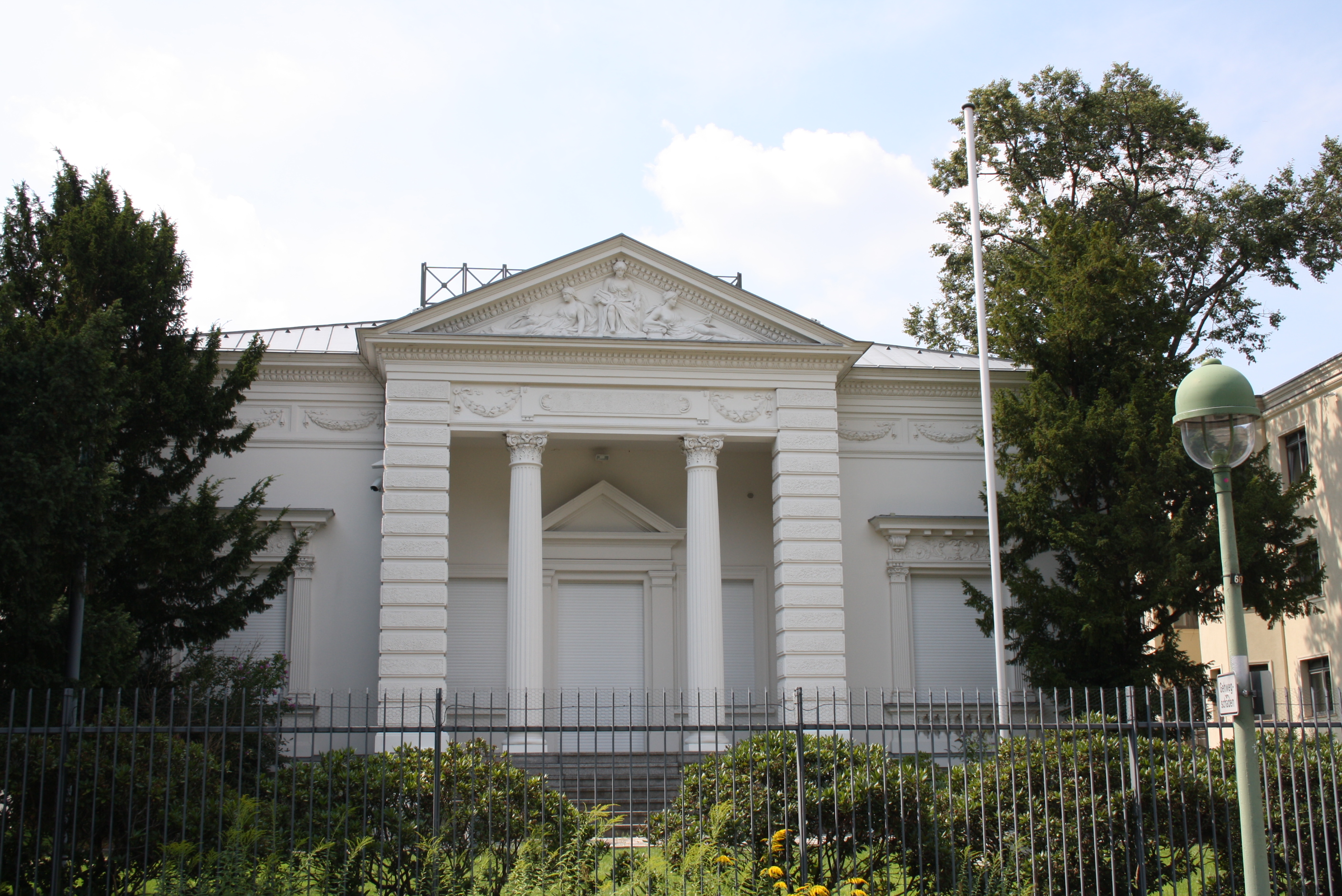 Majakowskiring2